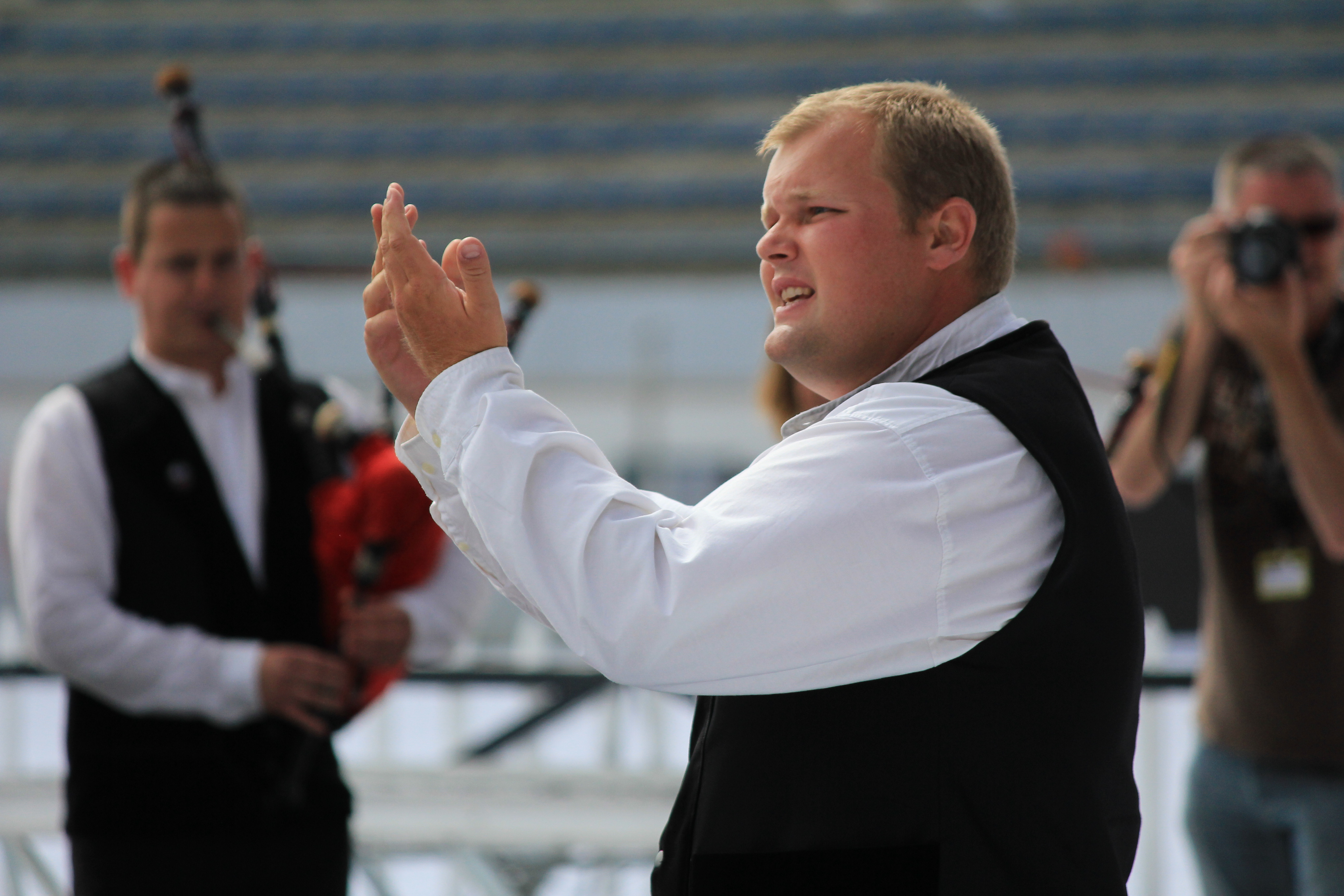 La Kevrenn Alre d'Auray lors de l'épreuve d'été du championnat national de bagadoù de 1ère division, organisé dans le cadre du Festival interceltique de Lorient, France. Sur la photo, son penn soner Julien Le Blé.